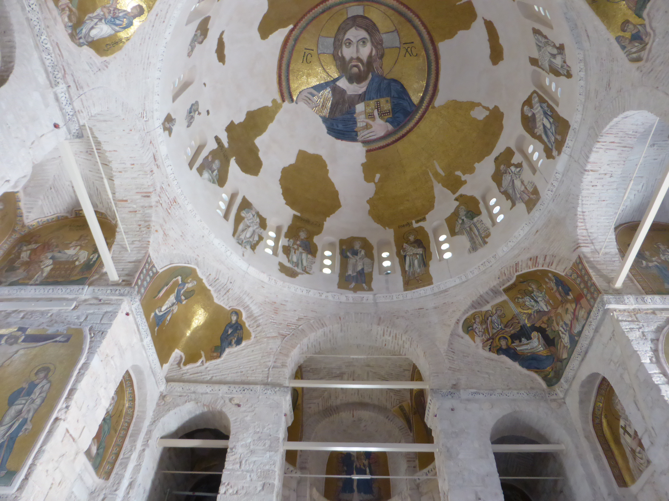 Kloster Daphni, nach schweren Erdbebenschäden restaurierte Mosaiken